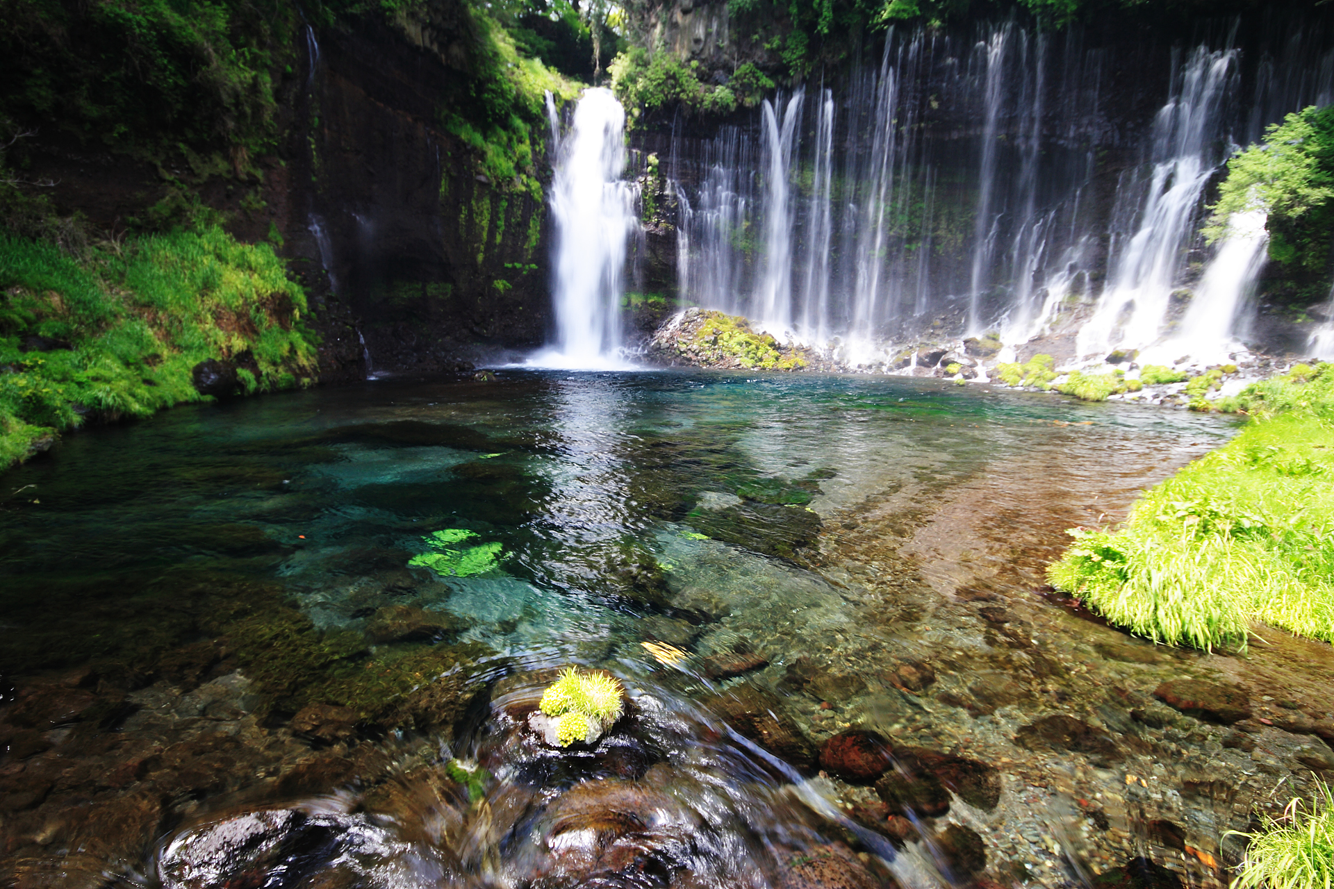 春の時期の白糸の滝。